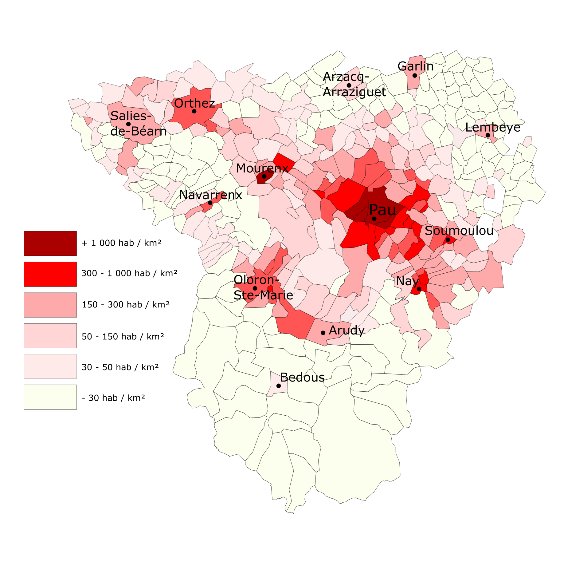 Carte exposant la densité des communes béarnaises (chiffres 2014)